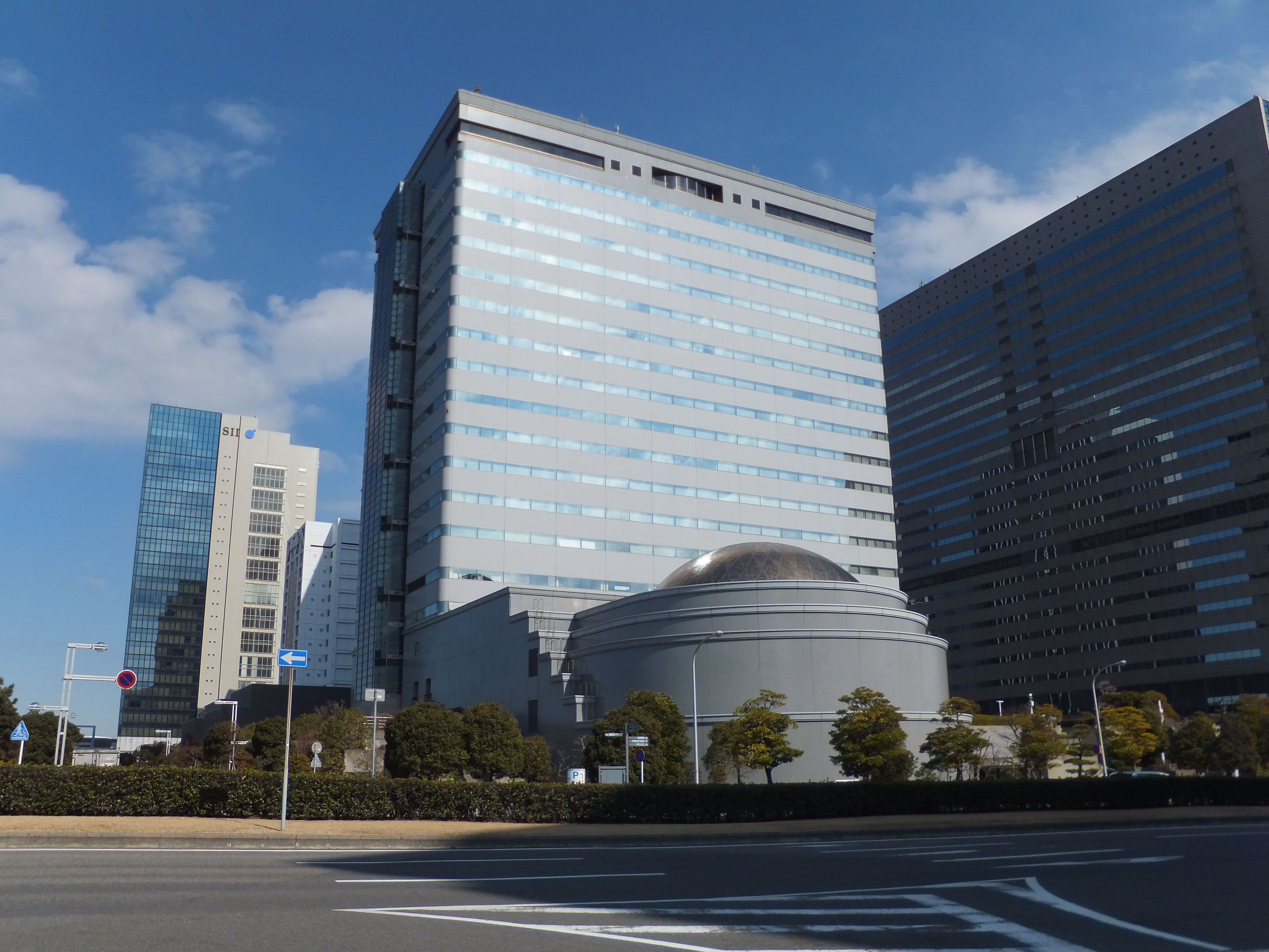 富士通幕張システムラボラトリ